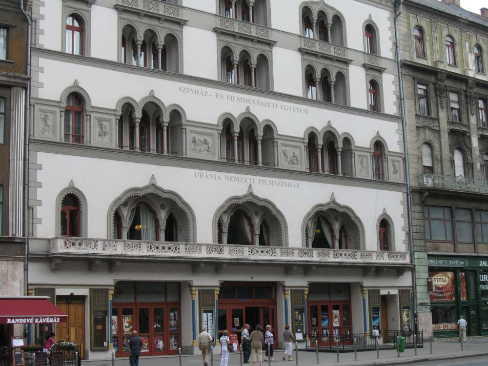 Színház- és Filmművészeti Egyetem (Budapest, VIII. ker., Rákóczi út 21.)